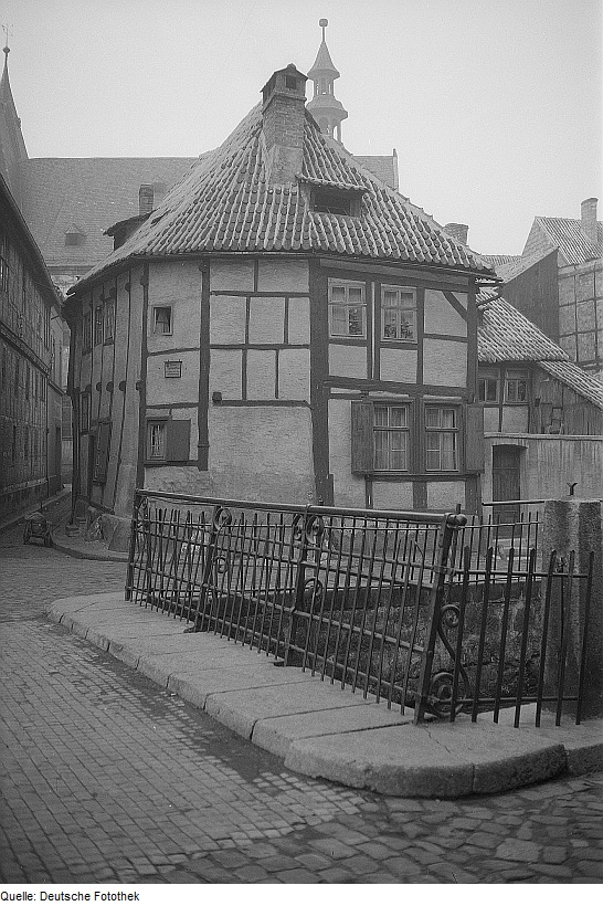 Original image description from the Deutsche Fotothek Quedlinburg. Ständerbau, ältestes Fachwerkgebäude der Stadt